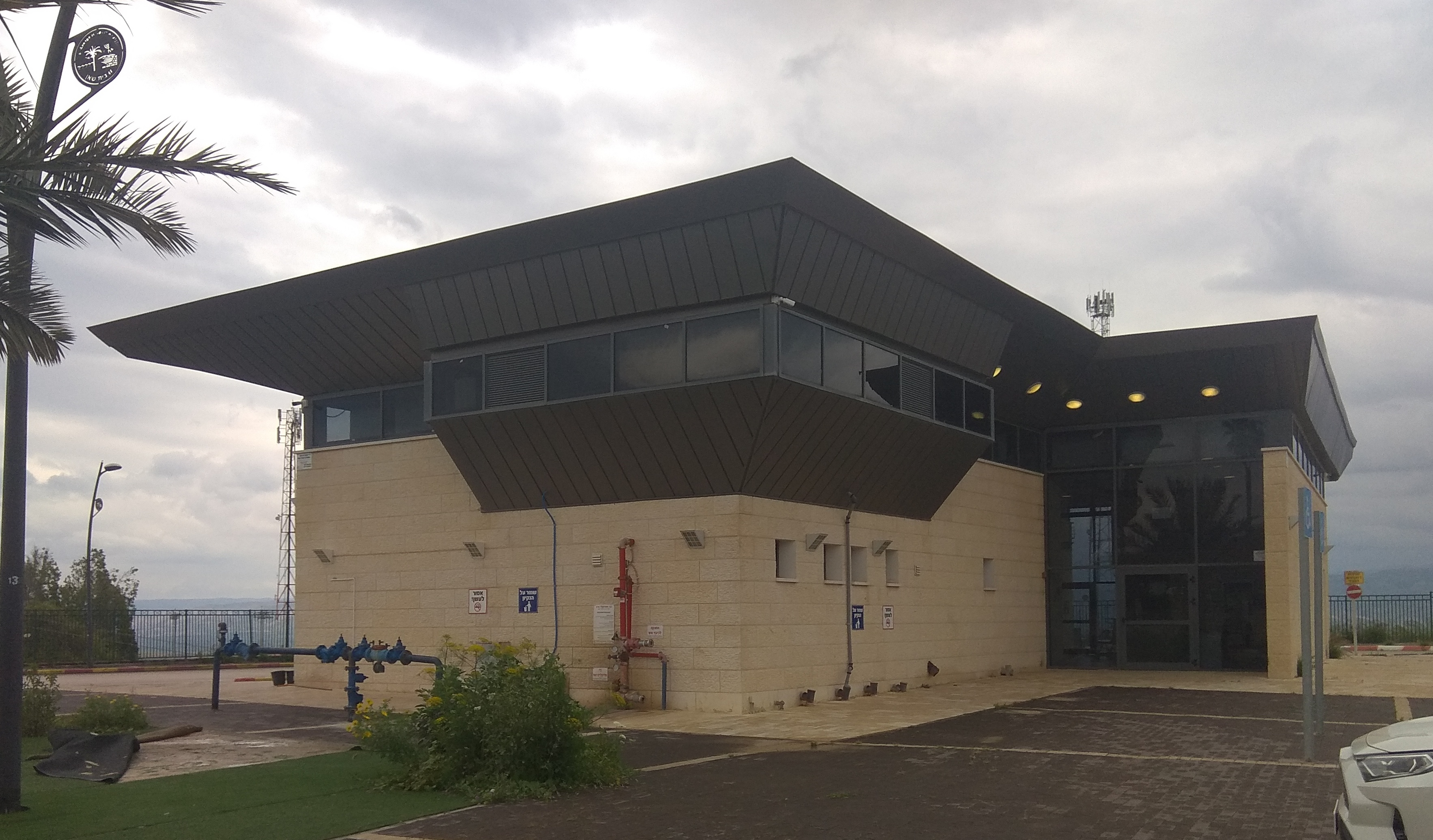 מבנה התחנה